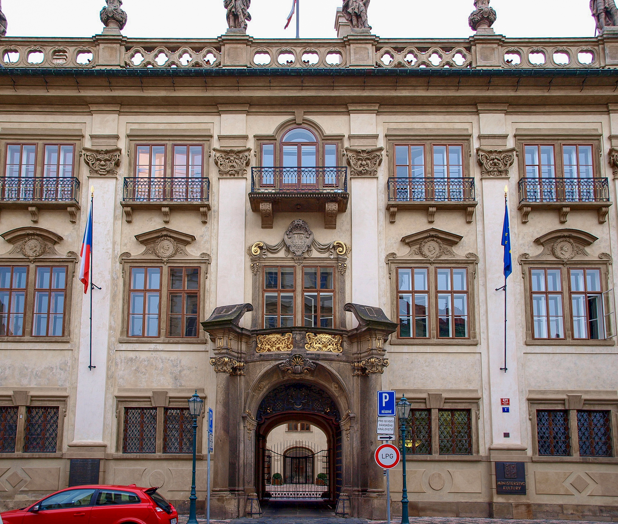 Nosticův palác